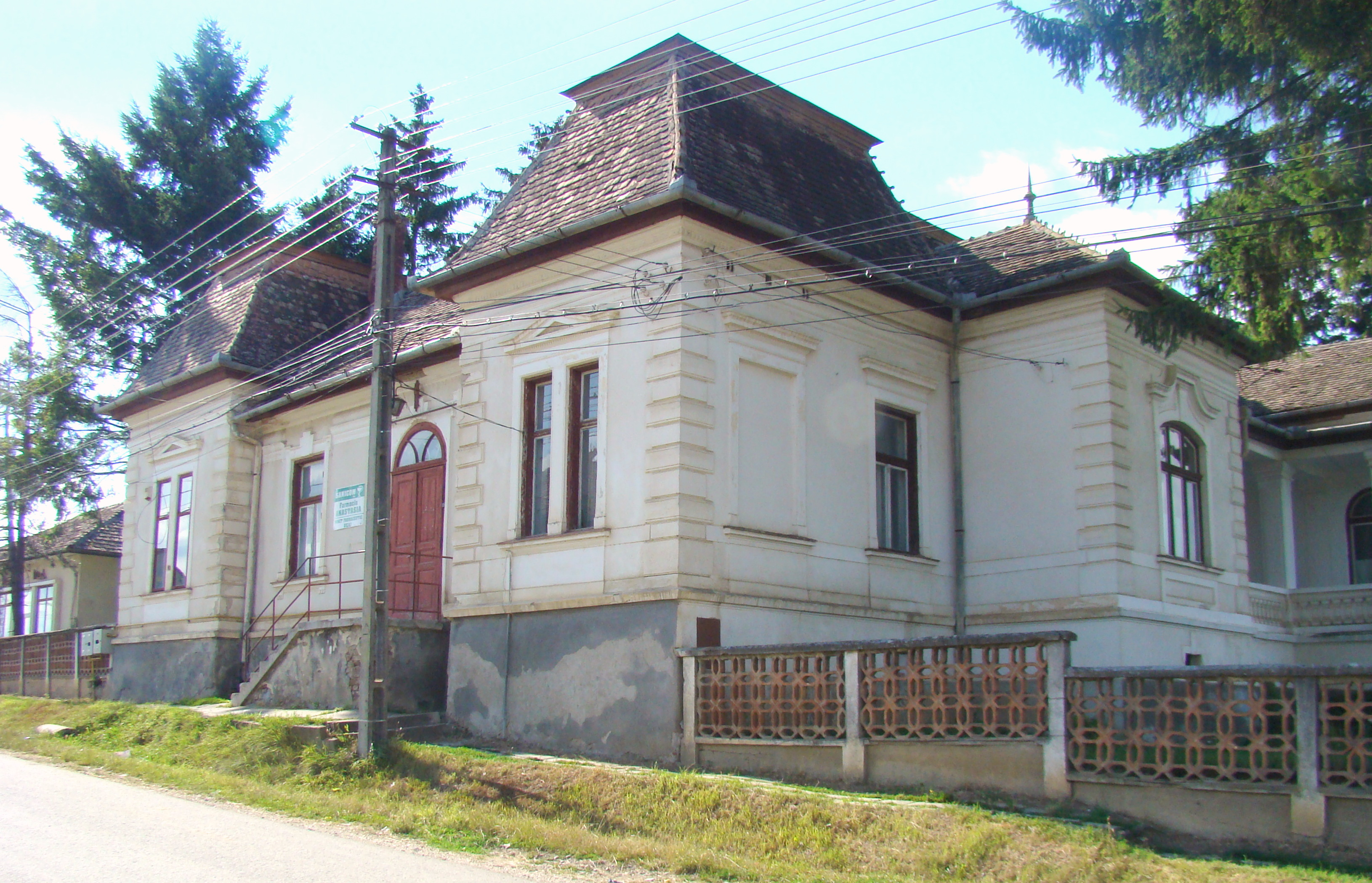 Reședință nobiliară (Conacul Pataki), sat Deaj; comuna Mica